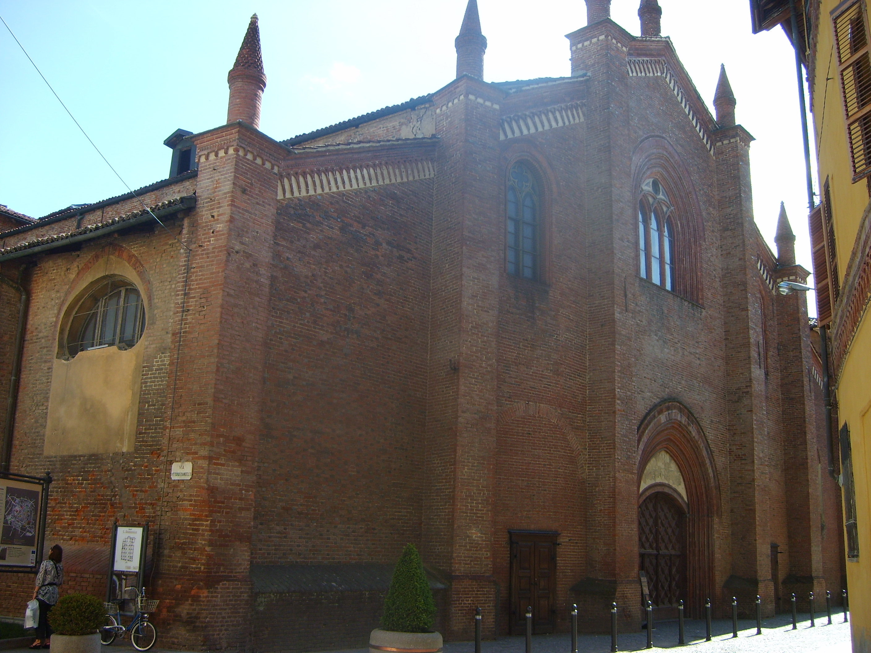 Facciata della chiesa di san Domenico a Chieri